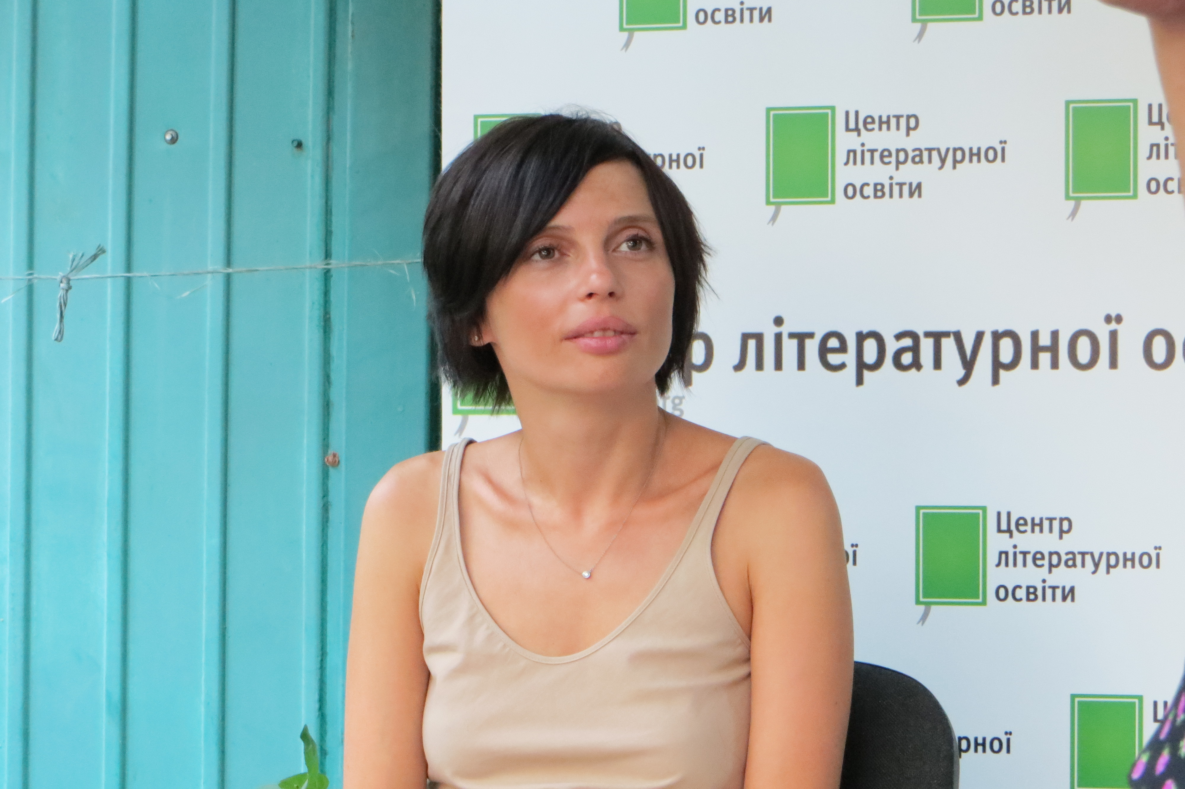 Ірена Карпа на лекції 8 липня 2015 року у Києві